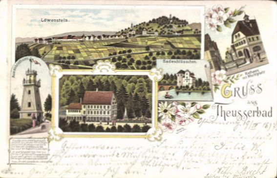 Ansichtskarte aus Theusserbad (heute Teusserbad)